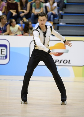 Pierre Meriel - Mondial 2014